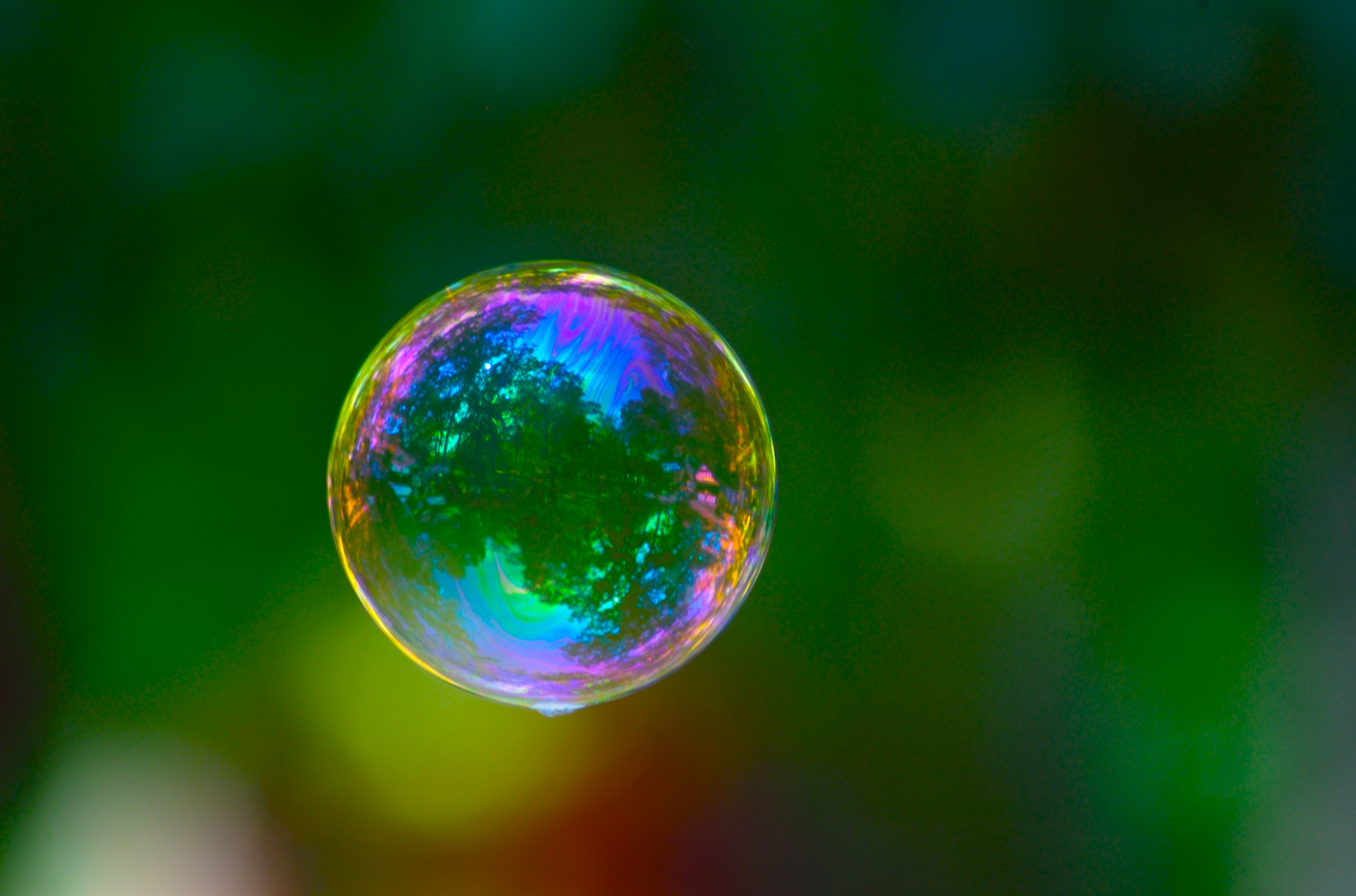 A bubble.